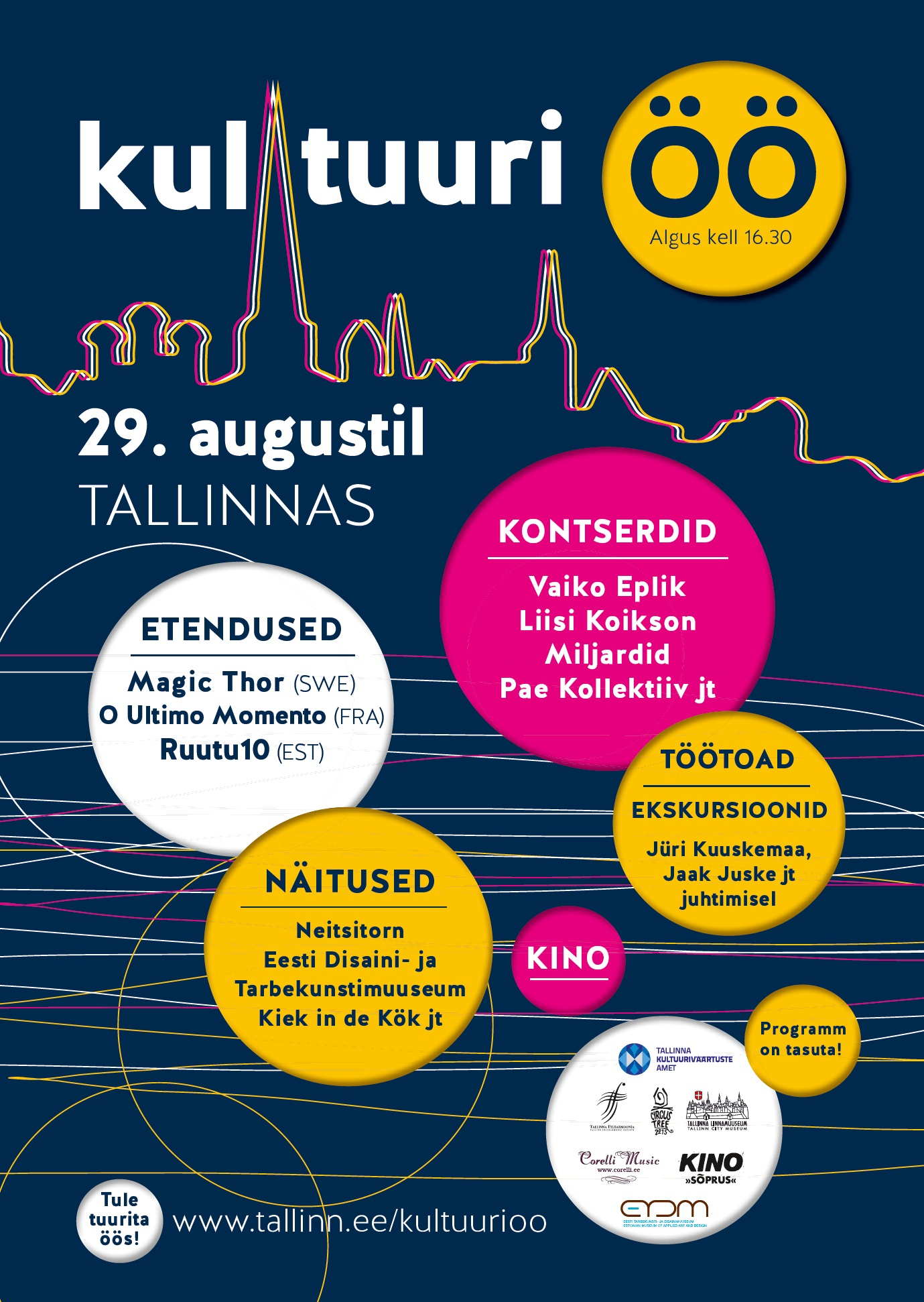 Kultuuriöö 2015